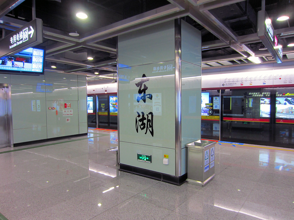 東湖站站台中部